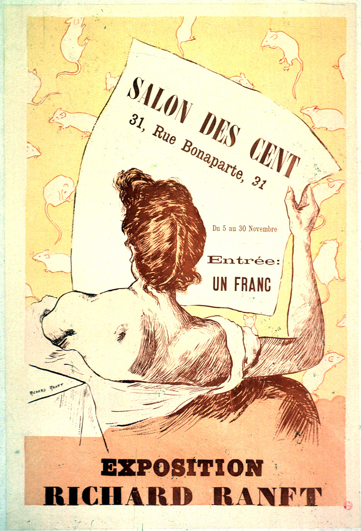 Lithographic poster for Salon des Cent - Exposition Richard Ranft, designed by Richard Ranft, and La Plume issue 6